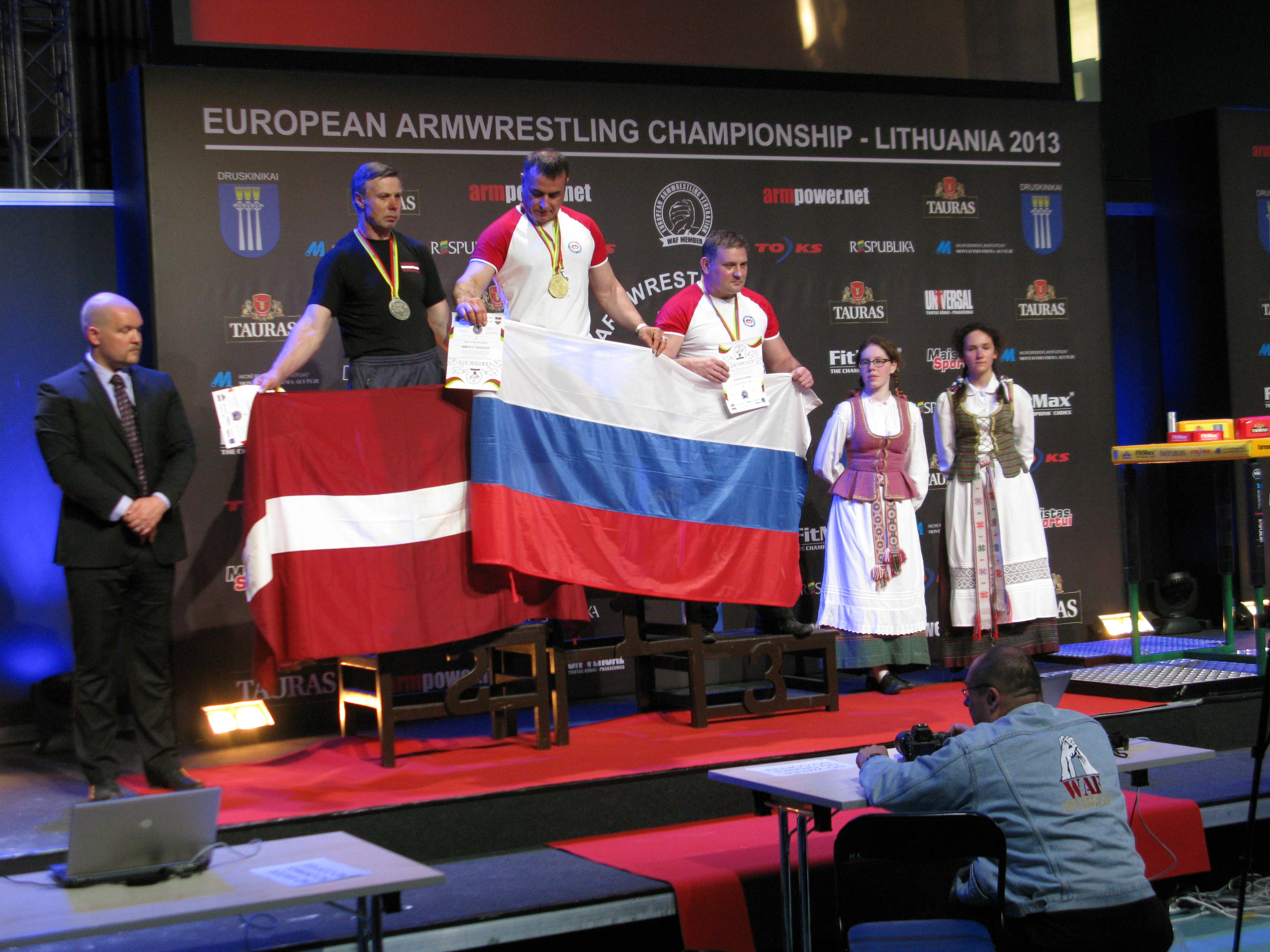 Призёры XXIII чемпионата Европы по армспорту. Литва, 2013 год.